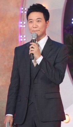 KBS 아나운서 도경완과 이선영